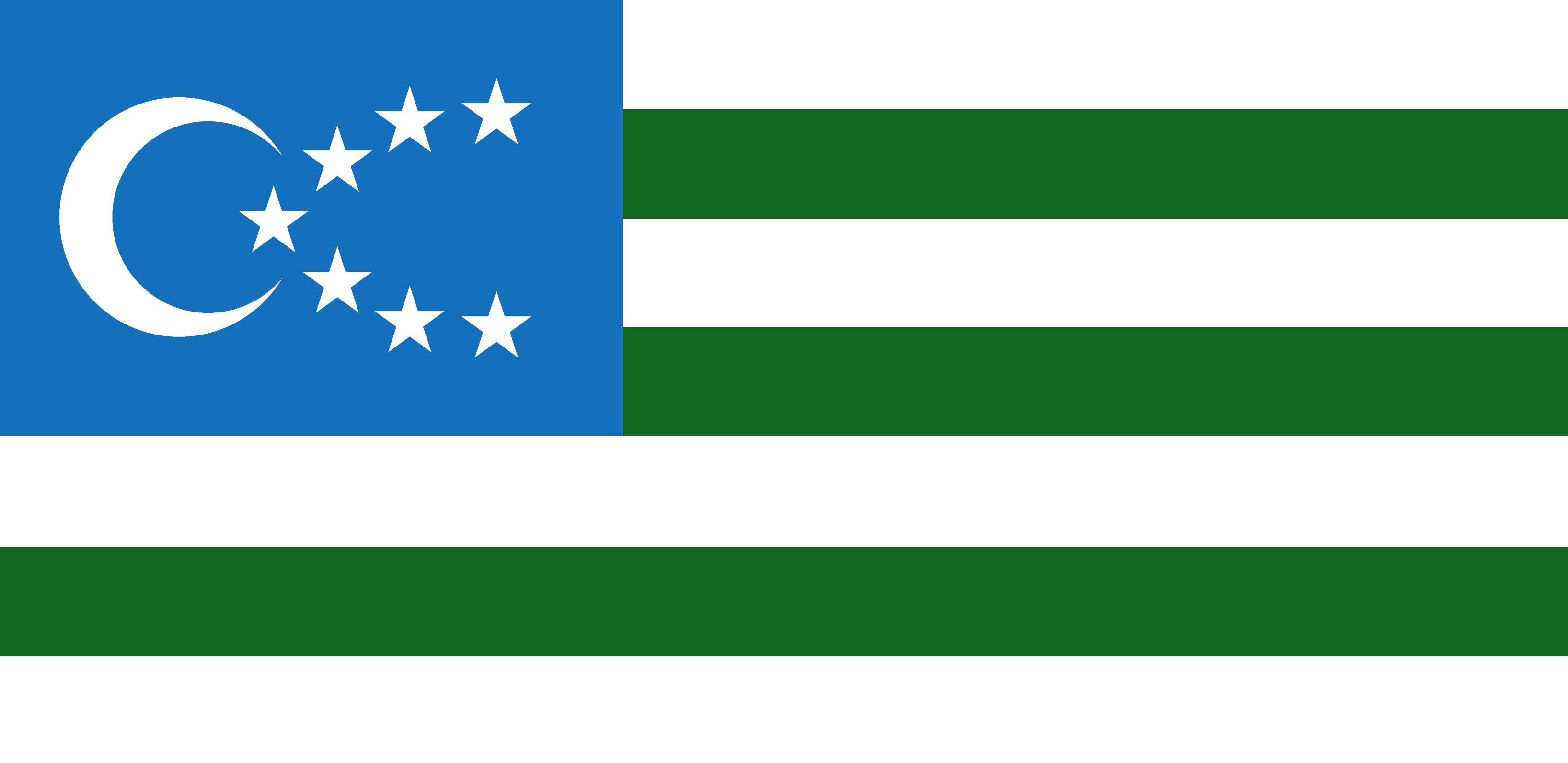 Флаг Горской республика, который указан в карте А. А. Цуциева